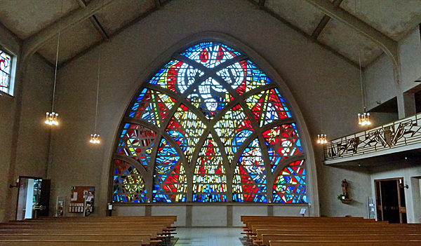 Heilig-Geist-Kirche Gutersloh; Fenster von Frans Griesenbrock